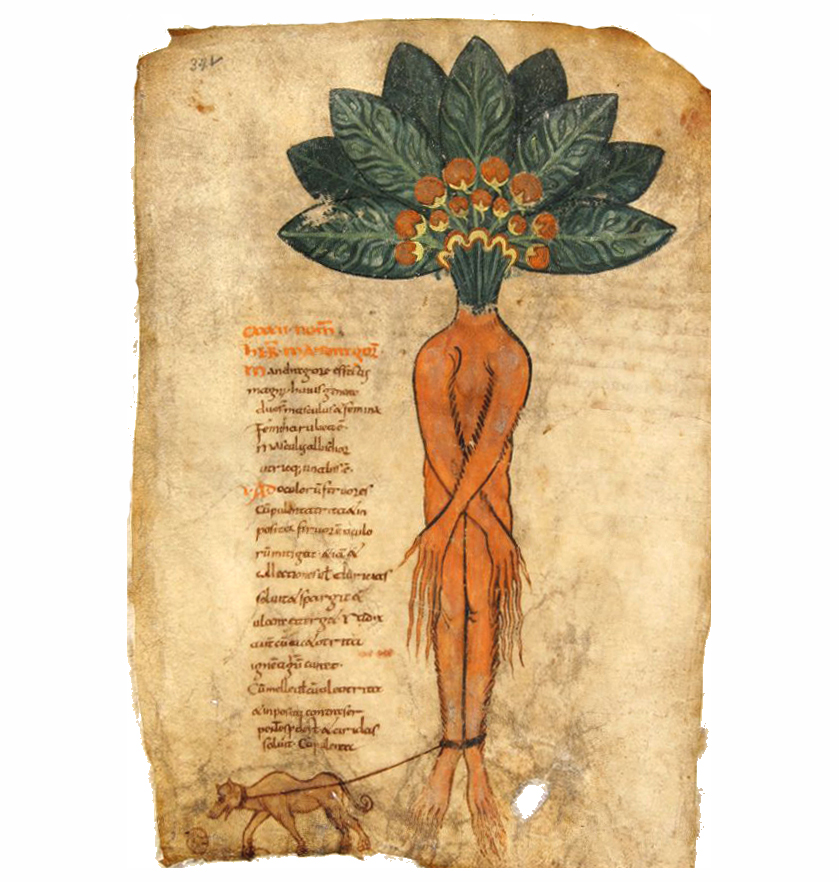 Abbildung der Mandragora